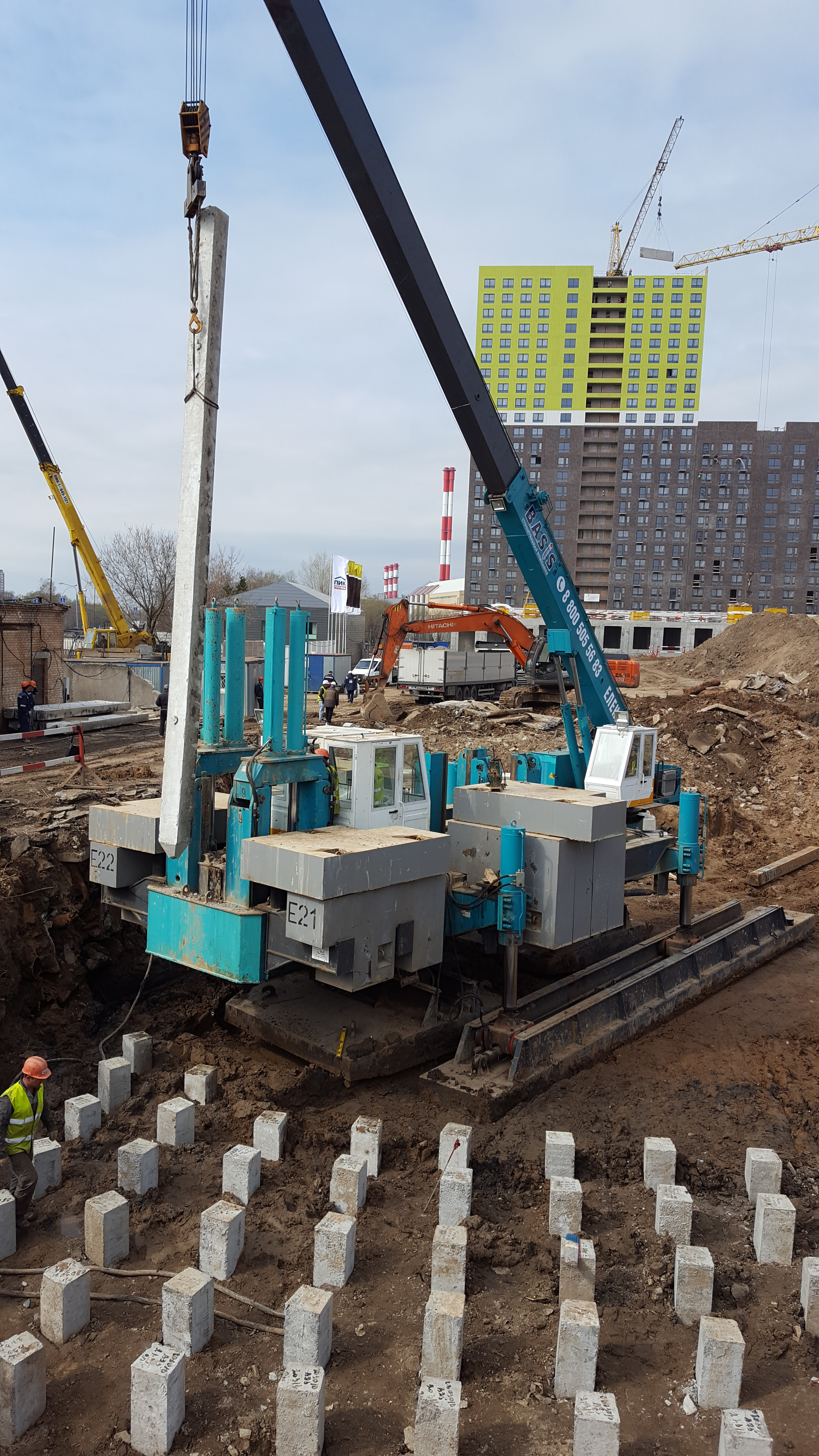 Погружение железобетонных свай